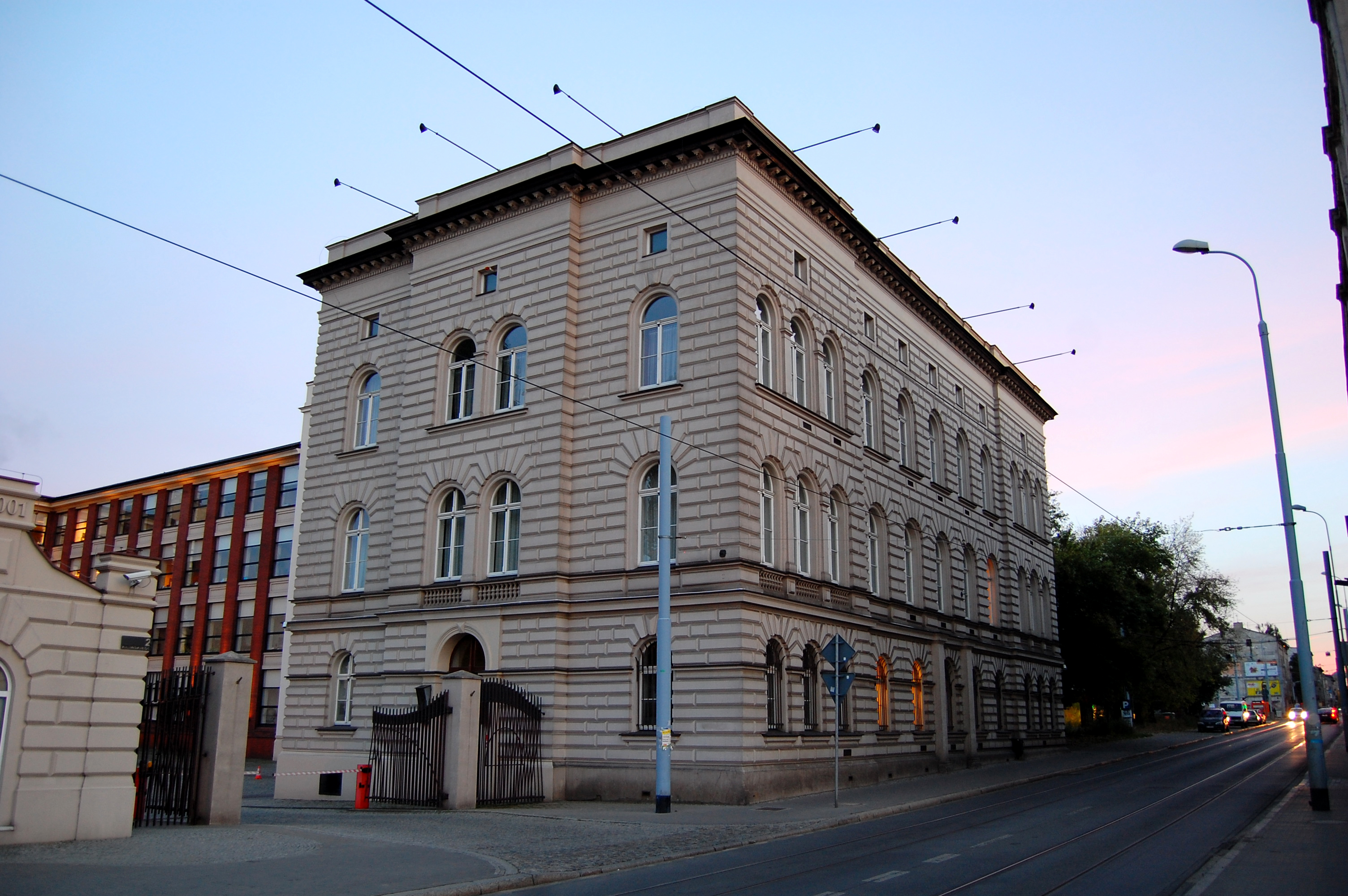 Łódź, ul. Kilińskiego 2